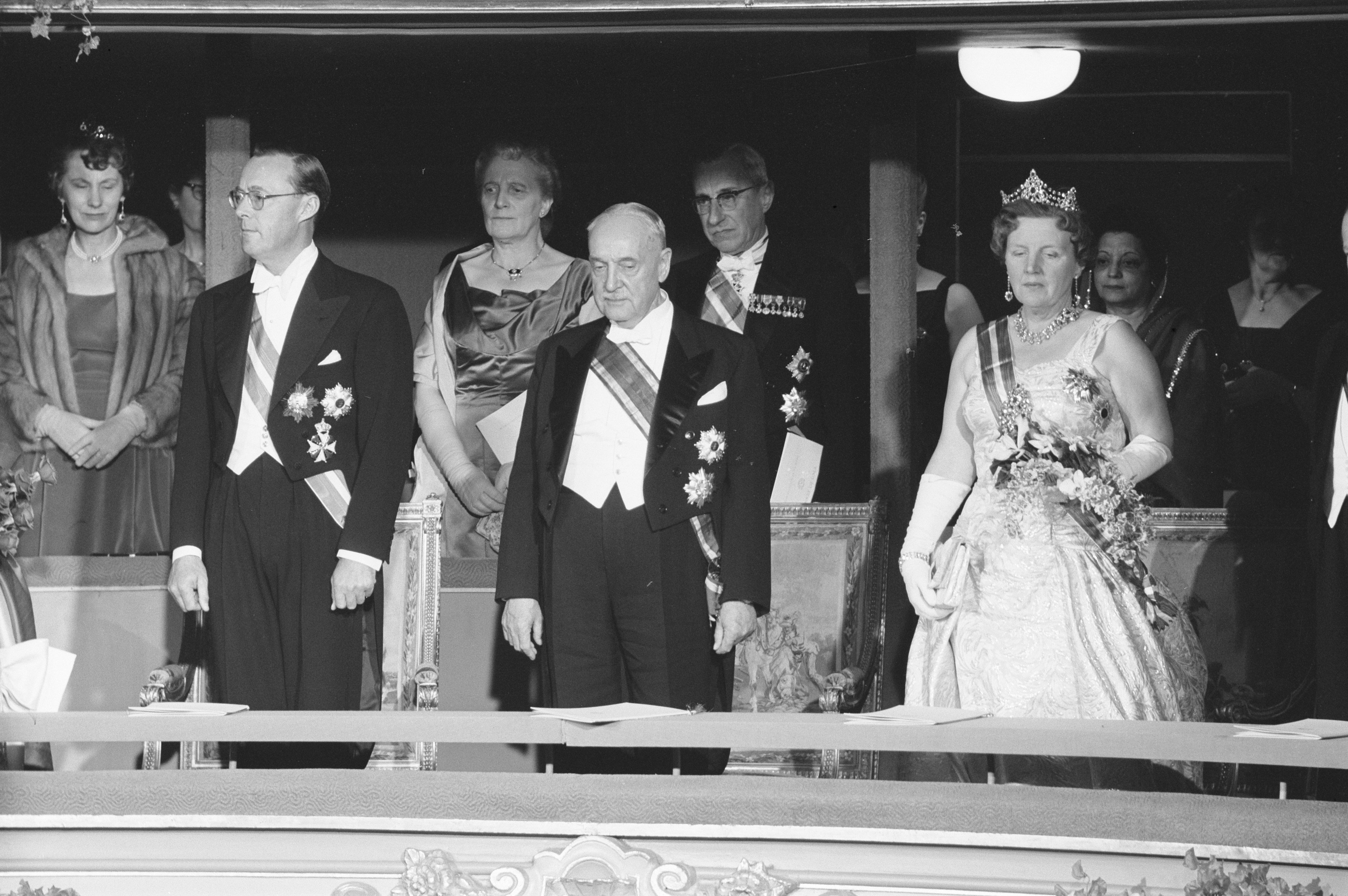 Collectie / Archief : Fotocollectie Anefo Reportage / Serie : Staatsbezoek bondspresident Oostenrijk 1961 Beschrijving : Staatsbezoek bondspresident van Oostenrijk Adolf Schärf. Geflankeerd door koningin Juliana en prins Bernhard tijdens een galavoorstelling in de Koninklijke Schouwburg te Den Haag Annotatie : Achter de president minister-president De Quay Datum : 17 mei 1961 Locatie : Den Haag Trefwoorden : presidenten, staatsbezoeken Persoonsnaam : Bernhard (prins Nederland), Juliana (koningin Nederland), Schärf, Adolf Fotograaf : Pot, Harry / Anefo Auteursrechthebbende : Nationaal Archief Materiaalsoort : Negatief (zwart/wit) Nummer archiefinventaris : bekijk toegang 2.24.01.05 Bestanddeelnummer : 912-4876